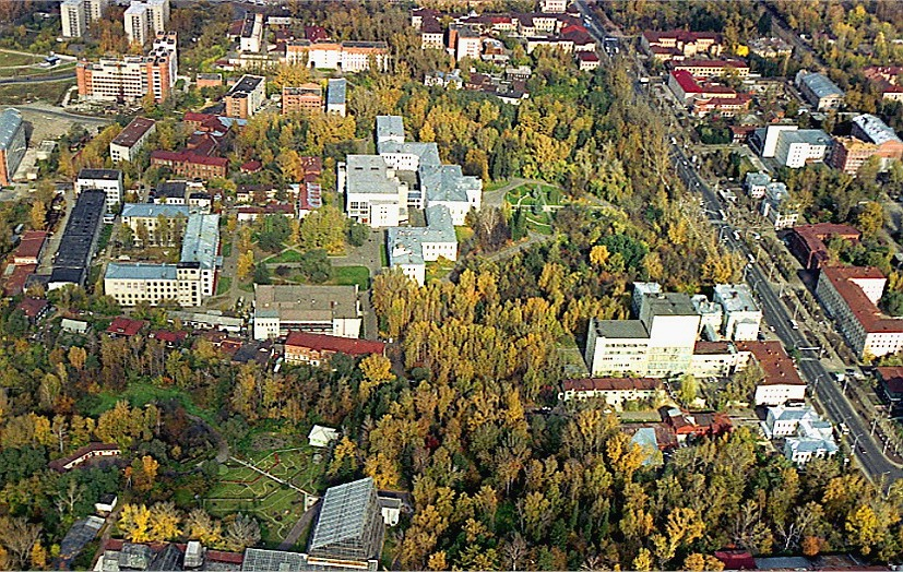 Университетская роща Томского Государственного университета, вид сверху